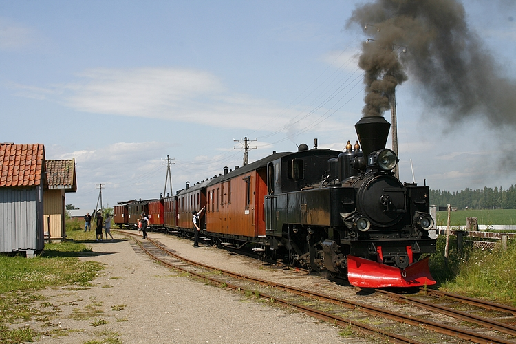 Fossum stasjon